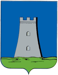 Herb miasteczka Krzywcze